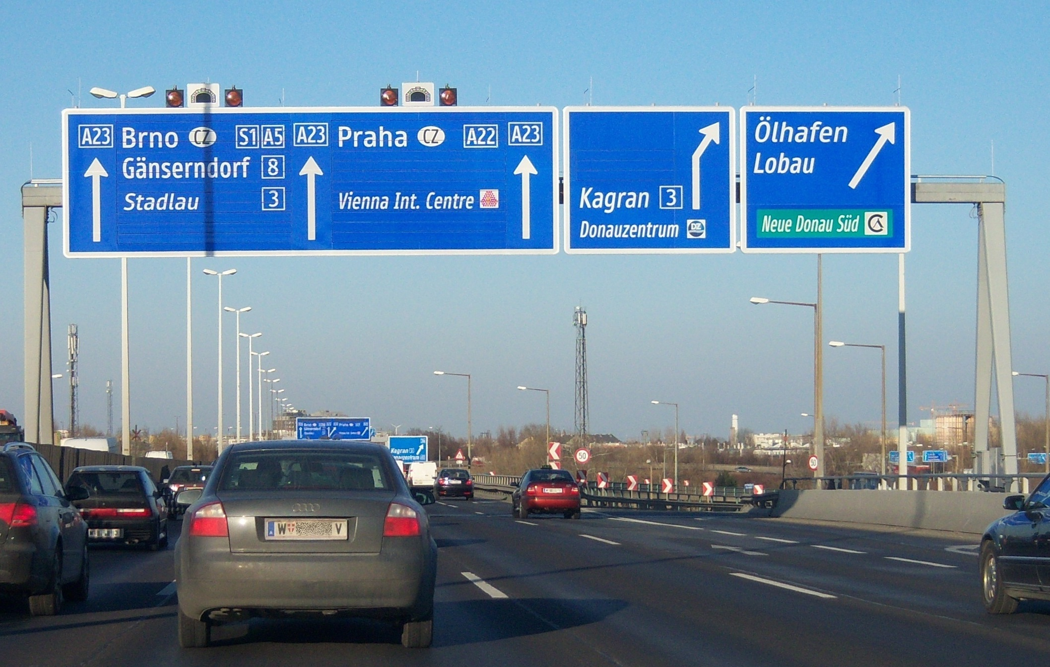 Autobahn Südosttangente Wien A23 Richtung Norden am Knoten Kaisermühlen